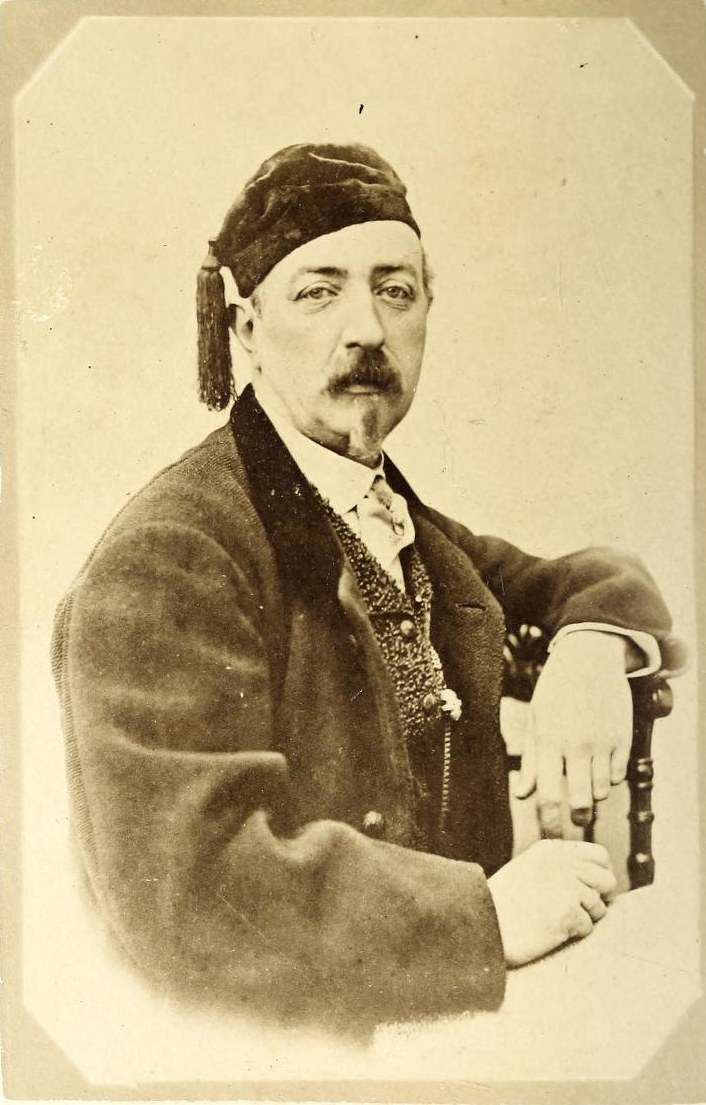 Il pittore Luigi Asioli (1817-1877)